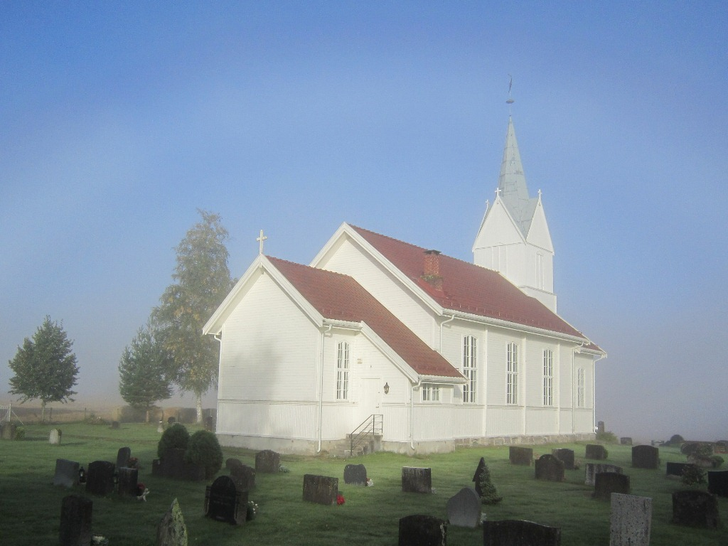 Glesne kapell, Krødsherad